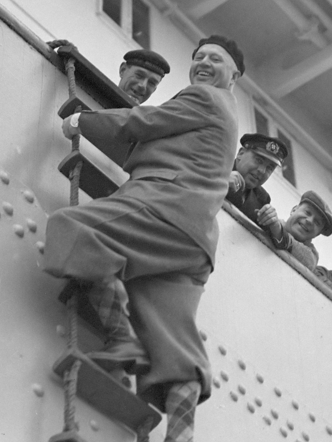 De heer Blitz op een touwladder langszij het schip MS Baloeran 1935